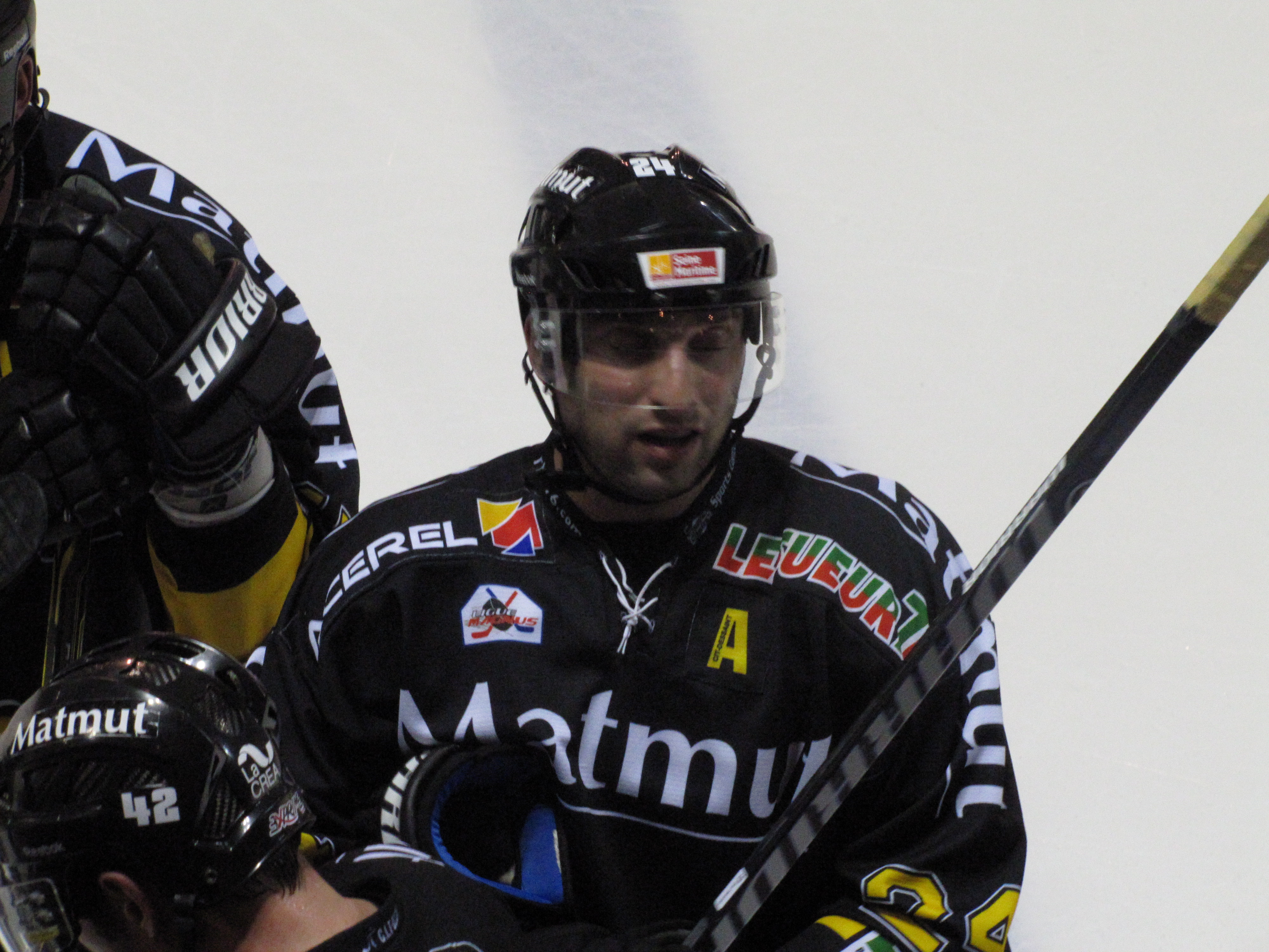 Marc-André Thinel lors de la Coupe Continentale de hockey 2012 à Rouen